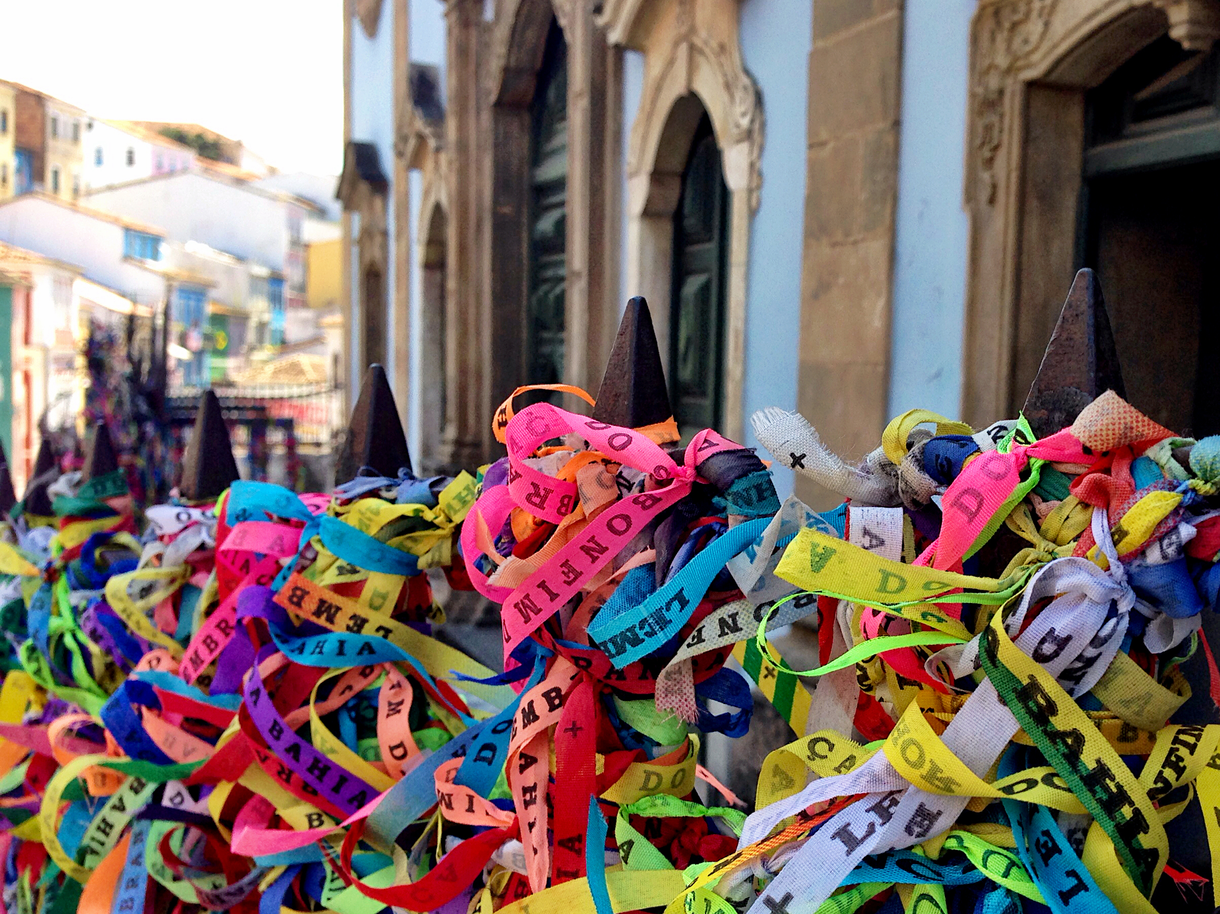 Fitinhas do Bonfim, na grade da Igreja de Nossa Senhora do Rosário dos Pretos.